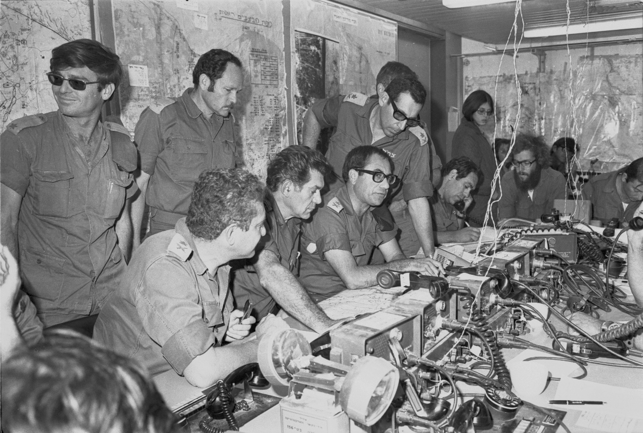 במרכז מימין לשמאל: עומד האלוף רחבעם זאבי (גנדי) , יושבים: אלוף פיקוד הדרום , אלוף שמואל גונן (גורודיש) , הרמטכ"ל , רא"ל דוד אלעזר , עוזר הרמטכ"ל , האלוף עזר ויצמן. על השולחן: מכשירי שט-900 עם מגבר שמע טל-92. התילים הצולבים (ג'מפרים) המשתלשלים מהתקרה הם אלתור לתוספת האזנה לרשתות רדיו, מעבר לתכנון המקורי של החפ"ק. בשולחן מותקנות מילואות לקווי נל"ן מגנטו, שיוצרו במש"א קשר. תוספת על פי תא"ל אפרים לפיד: יושב ראשון מימין (מדבר בקשר) - אל"מ שי תמרי, קצין אג"מ פיקוד הדרום עומד מאחרוי הרמטכ"ל דדו - תא"ל אשר לוי, רמ"ט פיקוד הדרום.